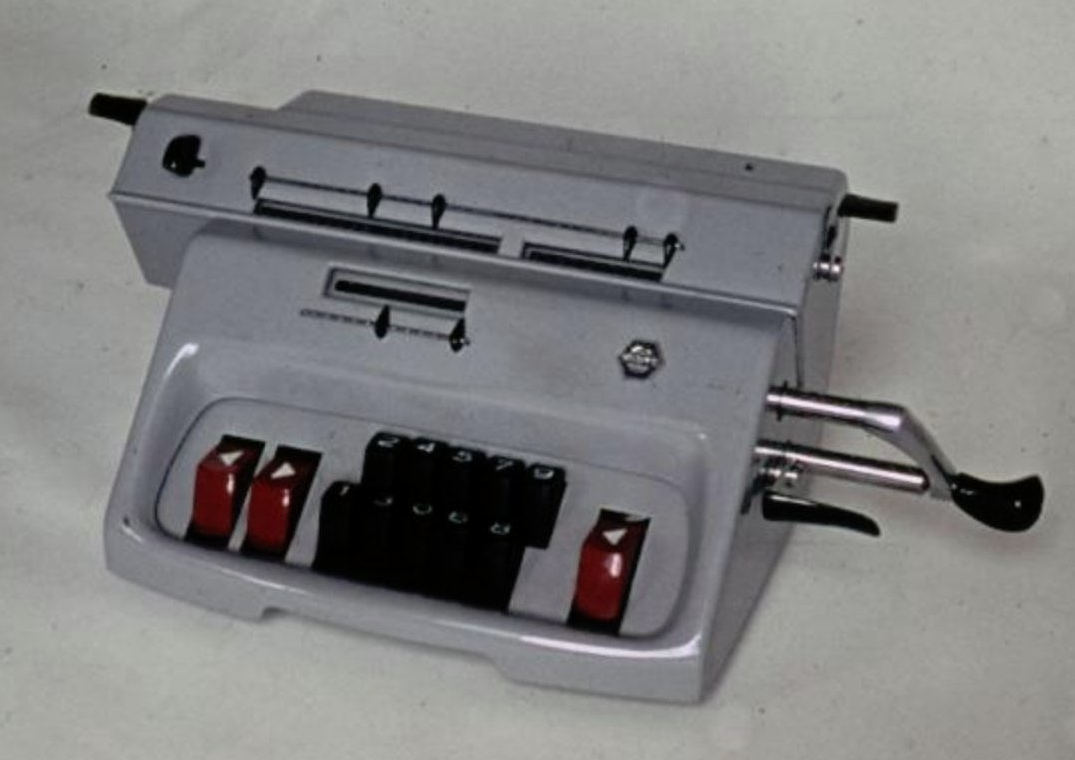 Maszyna do liczenia - projektanci: Józef Kandefer, A. Szczepański, Andrzej Kasten